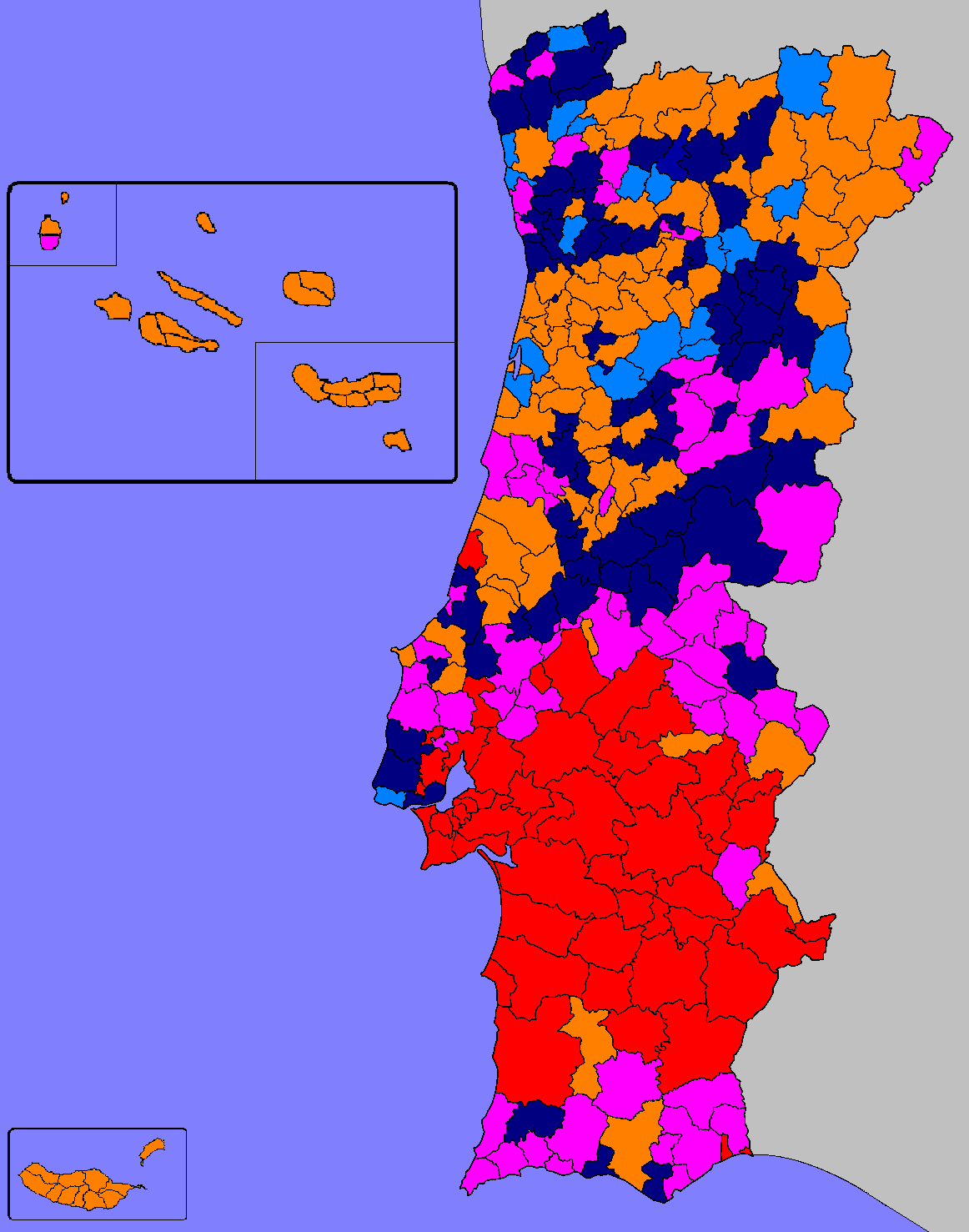 Mapa ilustrativo do partido mais votado